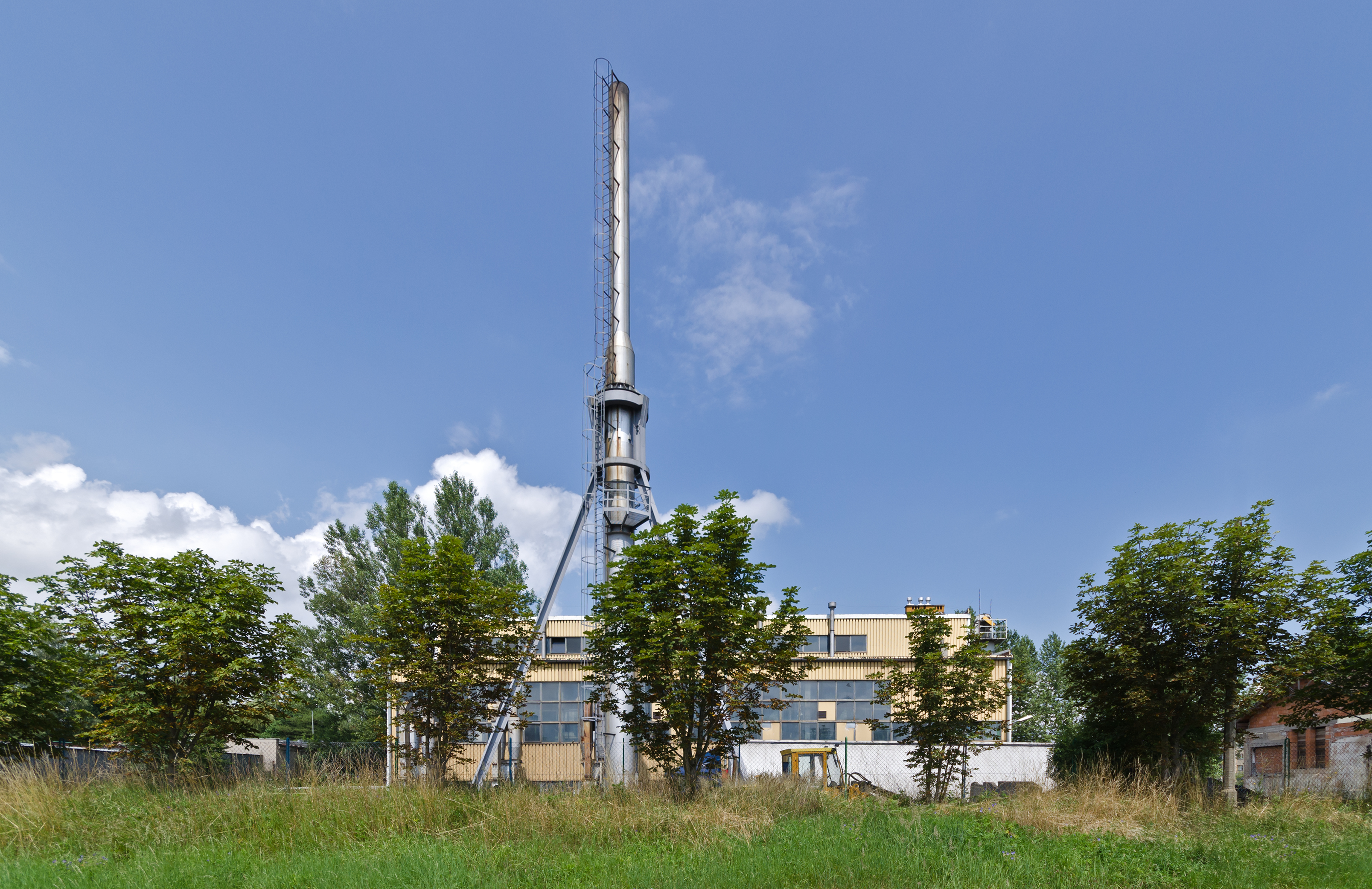 Kłodzko, ul. Łąkowa, elektrociepłownia